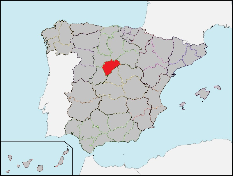 Ubicación de la provincia de Segovia en la España de los años treinta